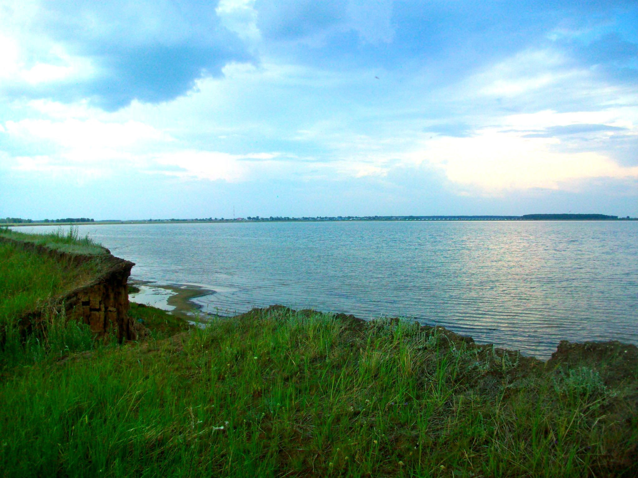 Горькое озеро, Баганский район This image is related to the protected area of Russia number 5410005